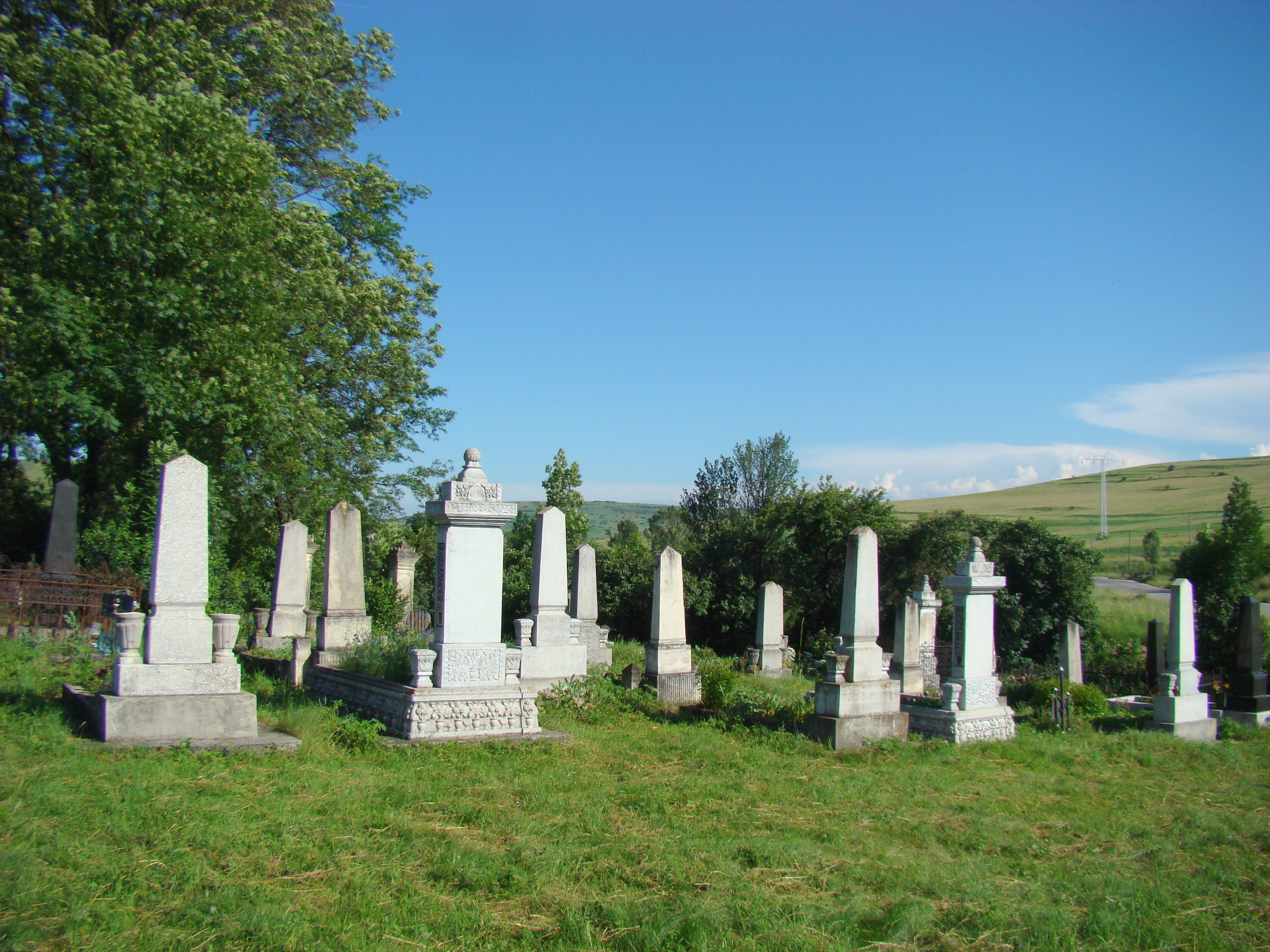 Biserica reformată, sat DOROLŢU; comuna AGHIREŞU, Cluj 01